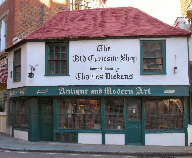 Здание магазина The Old Curiosity Shop в Лондоне